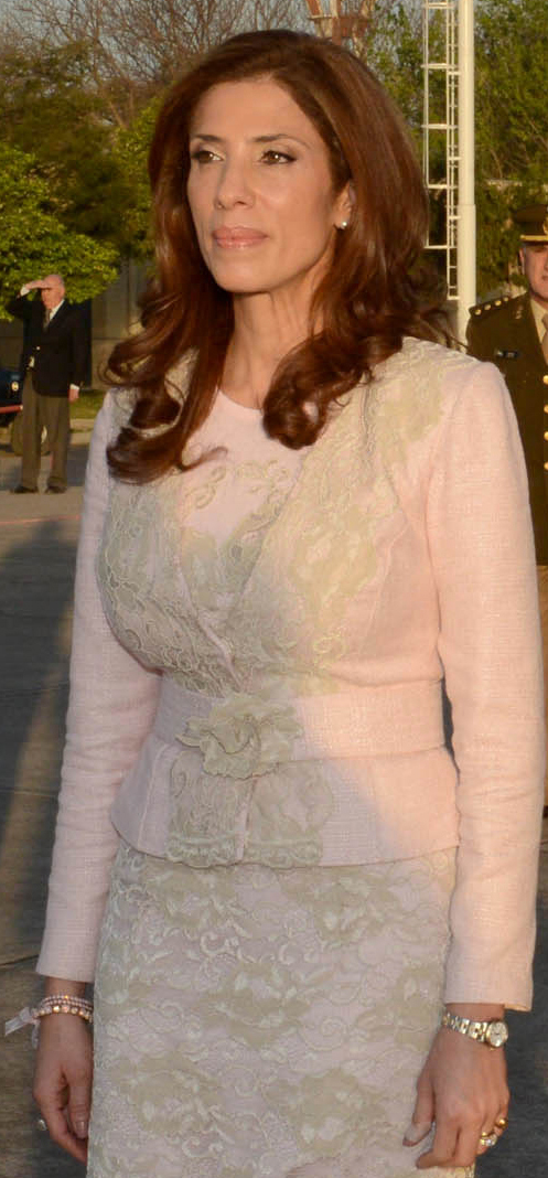 La gobernadora de la provincia de Santiago del Estero, Claudia Ledesma Abdala de Zamora.